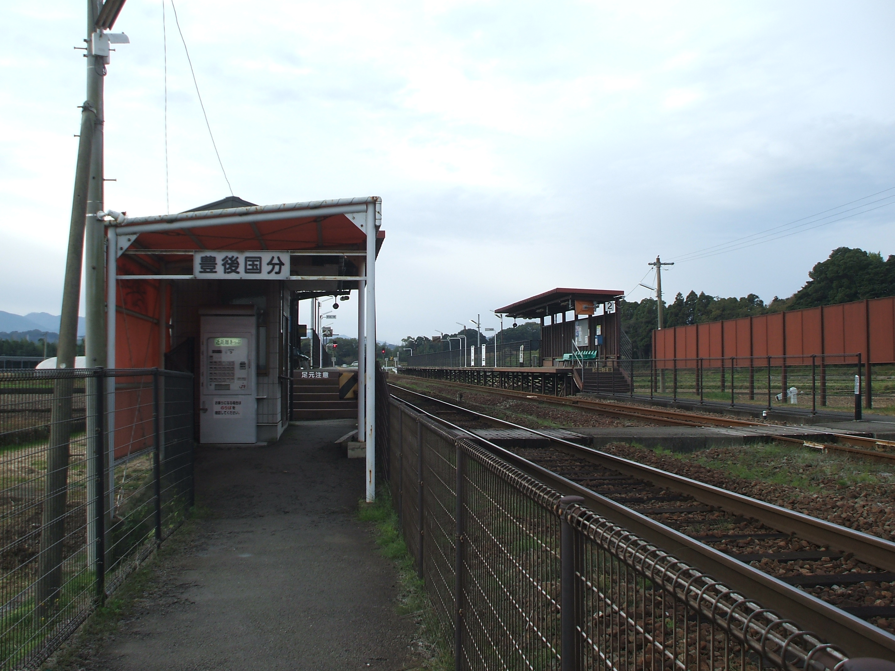 大分県大分市にある九州旅客鉄道（JR九州）久大本線豊後国分駅